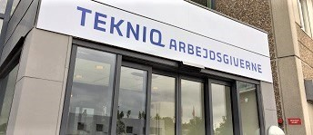 TEKNIQ Arbejdsgiverne har cirka 60 medarbejdere placeret i Glostrup og 20 medarbejdere i Odense.